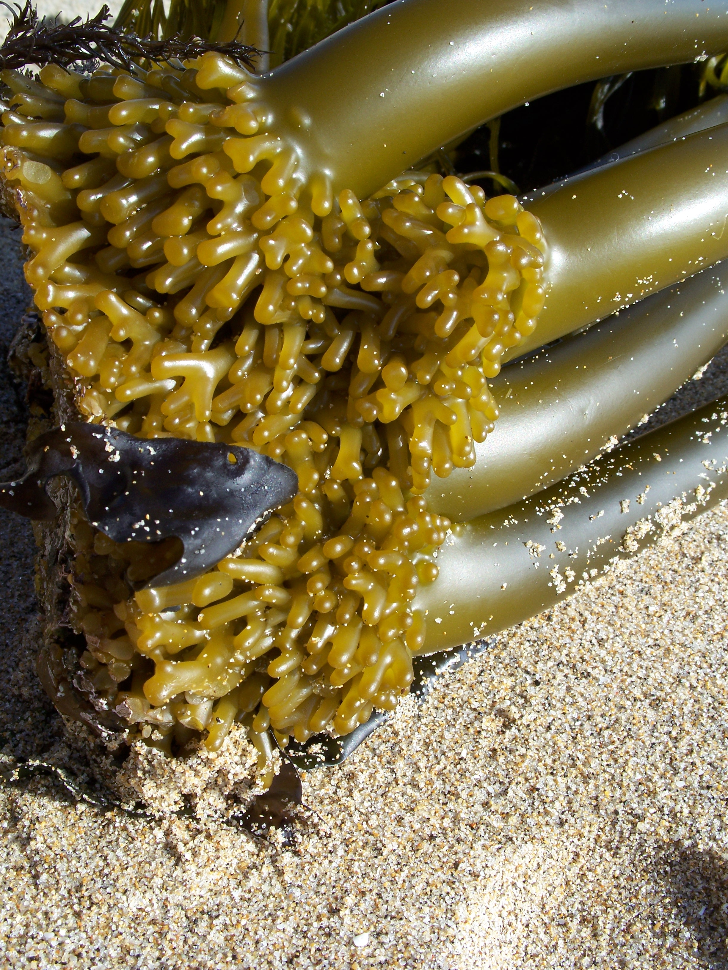 Postelsia palmaeformis Made in San Gregorio State Beach, California, USA. Identified by EncycloPetey